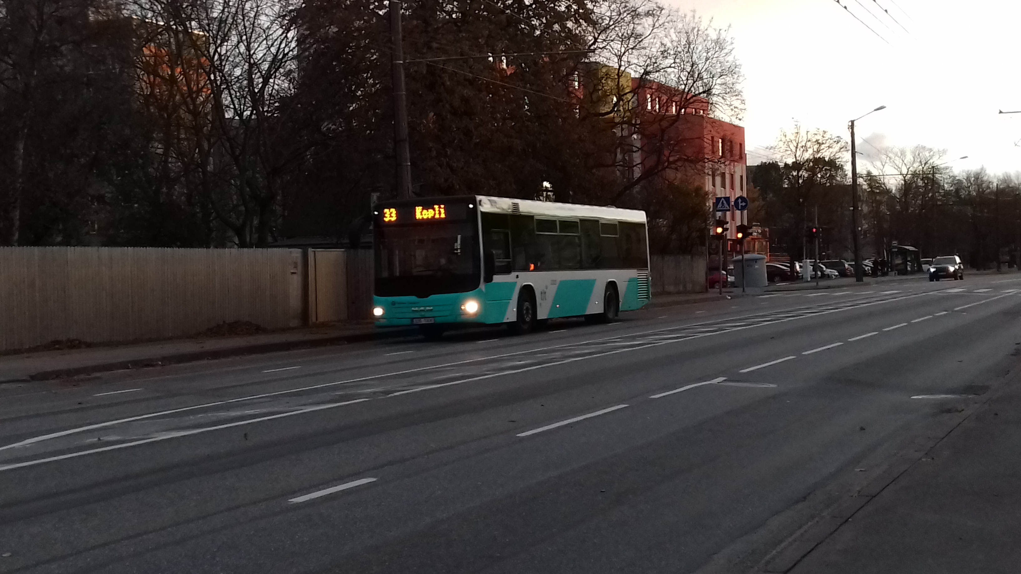 33. bussiliin Mustamäe teel